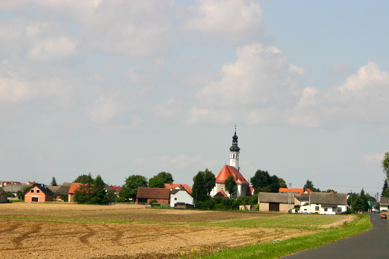 Racławiczki (dodatkowa nazwa w j. niem. Rasselwitz; od 1939 Roßtal O. S., pol. hist. Racławice Polskie[1]) – wieś w Polsce położona w województwie opolskim, w powiecie krapkowickim, w gminie Strzeleczki.